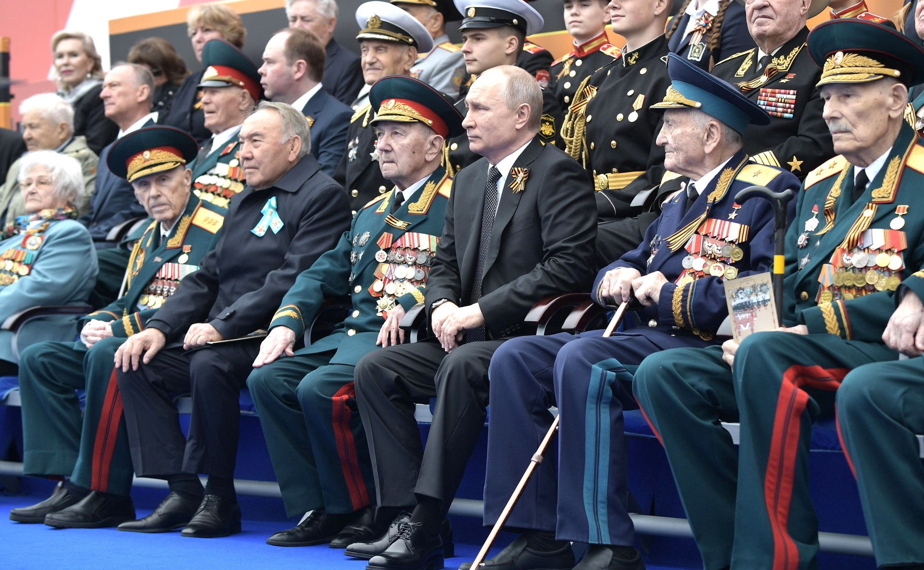 Военный парад на Красной площади в ознаменование 74-й годовщины Победы в Великой Отечественной войне 1941–1945 годов